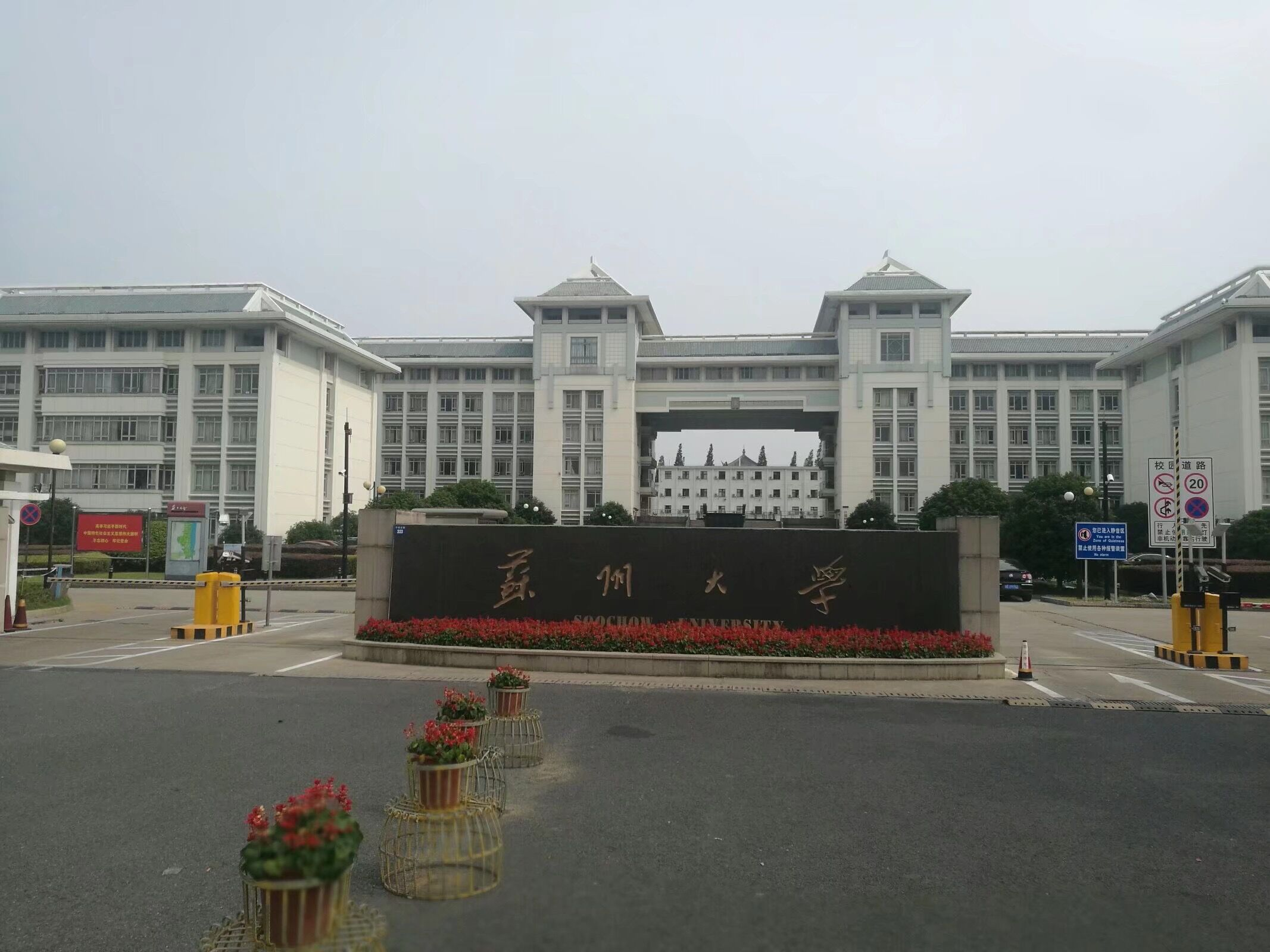 中文（中国大陆）: 苏州大学的正门照片，双开门结构，大门较宽阔。